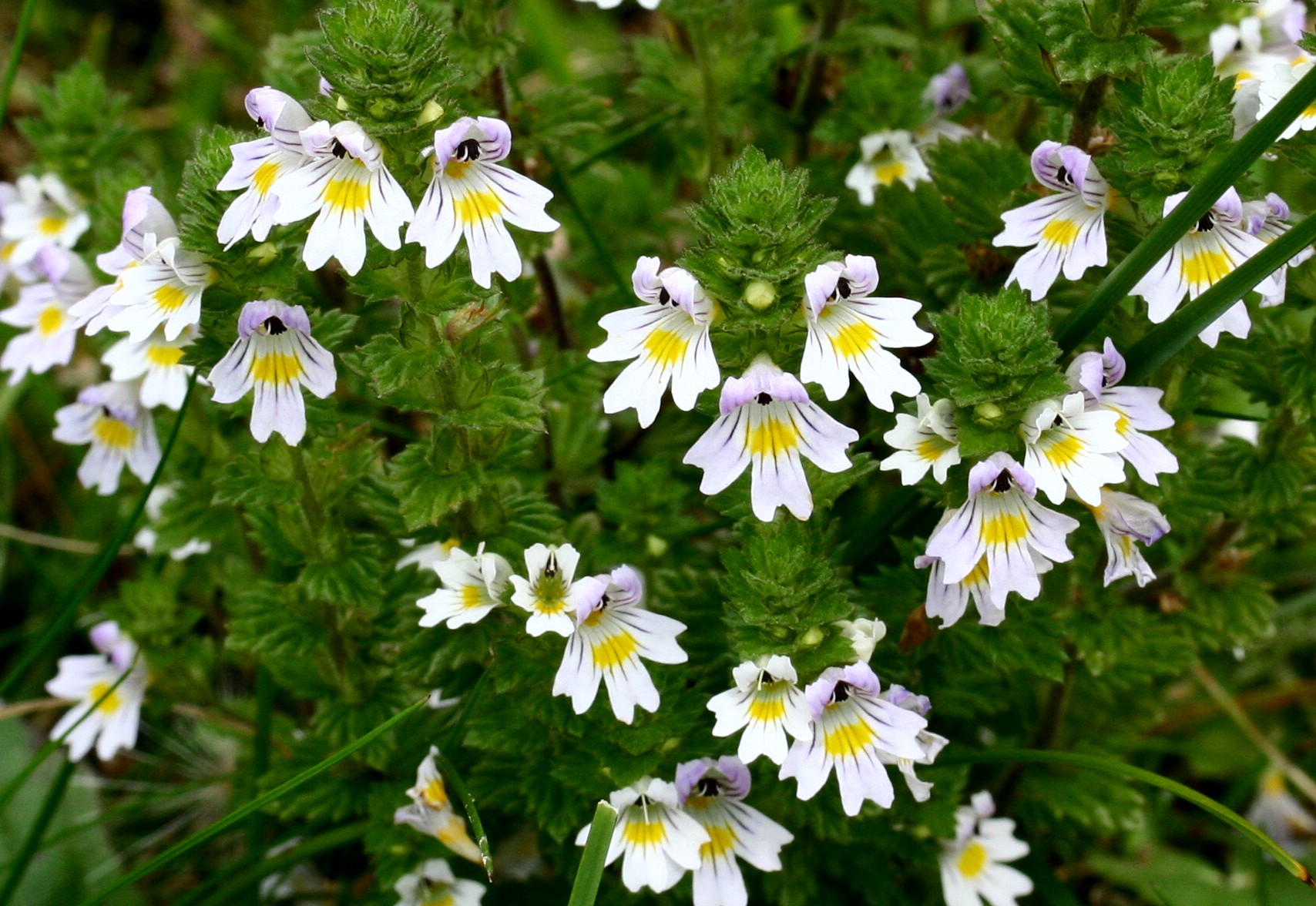 Eufrasia officinale - Località : "Giardino Botanico delle Alpi Orientali", Monte Faverghera (BL), 1500 m s.l.m.